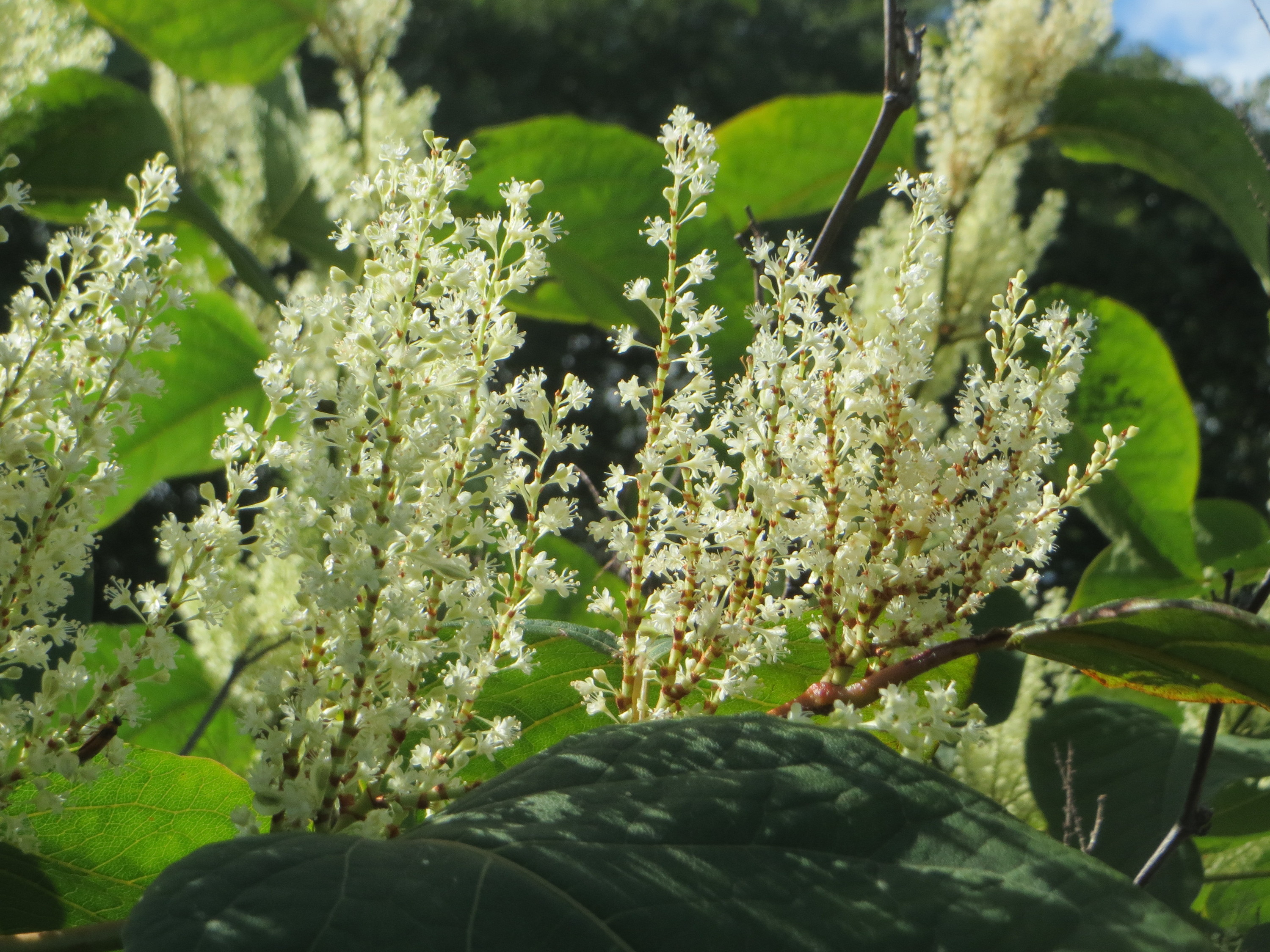 Bastard-Flügelknöterich oder Böhmischer Knöterich (Reynoutria × bohemica) an der Saar in Saarbrücken